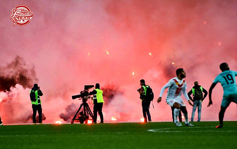 CR Belouizdad fans in 2016